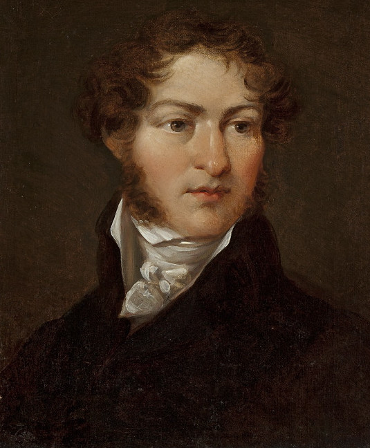 Ян Рустэм. Партрэт Джозефа Саўндэрса